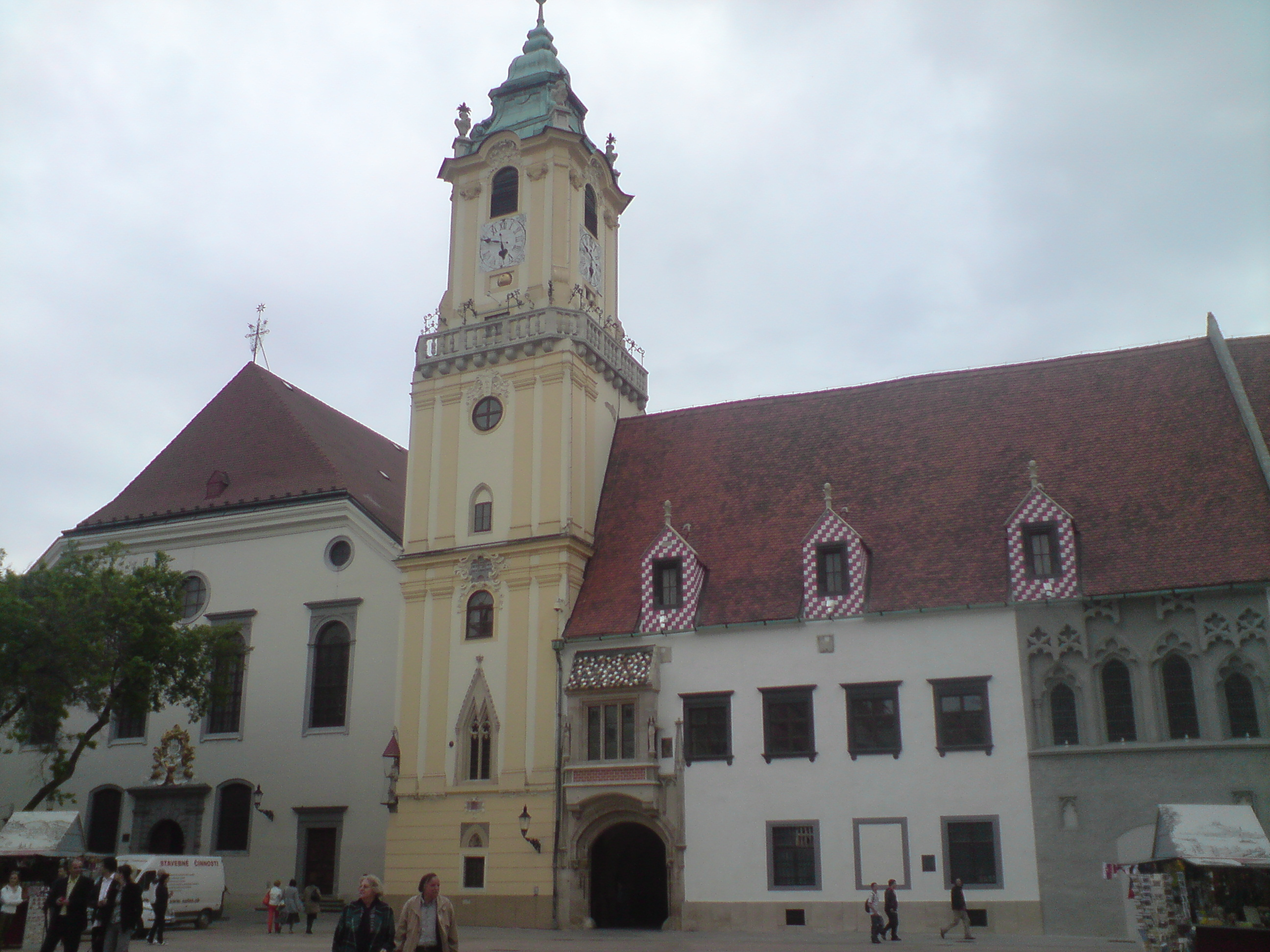 Stará radnica, Bratislava